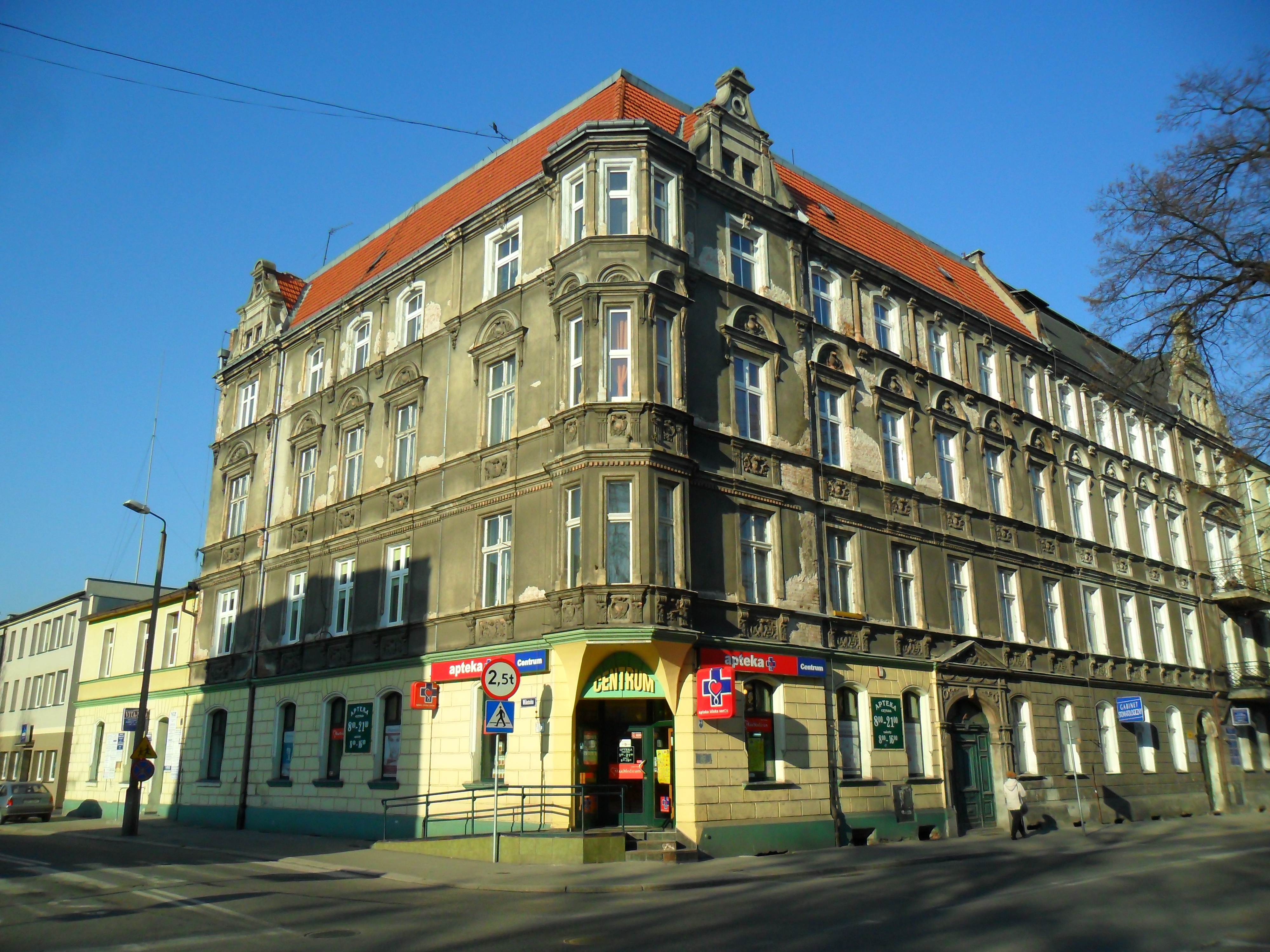 Kamienica na rogu ulicy Wileńskiej i Wojska Polskiego.